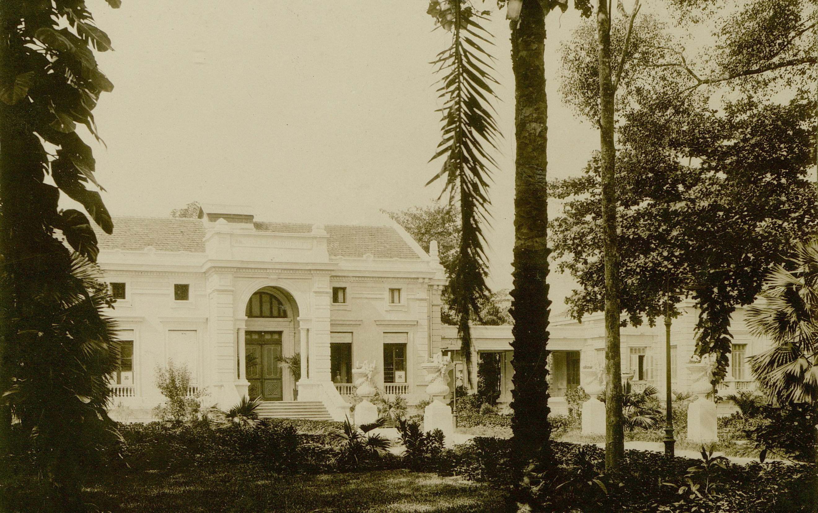 Ảnh tư liệu